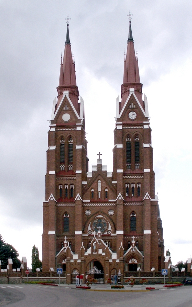 Švėkšnos Šv. apaštalo Jokūbo bažnyčia